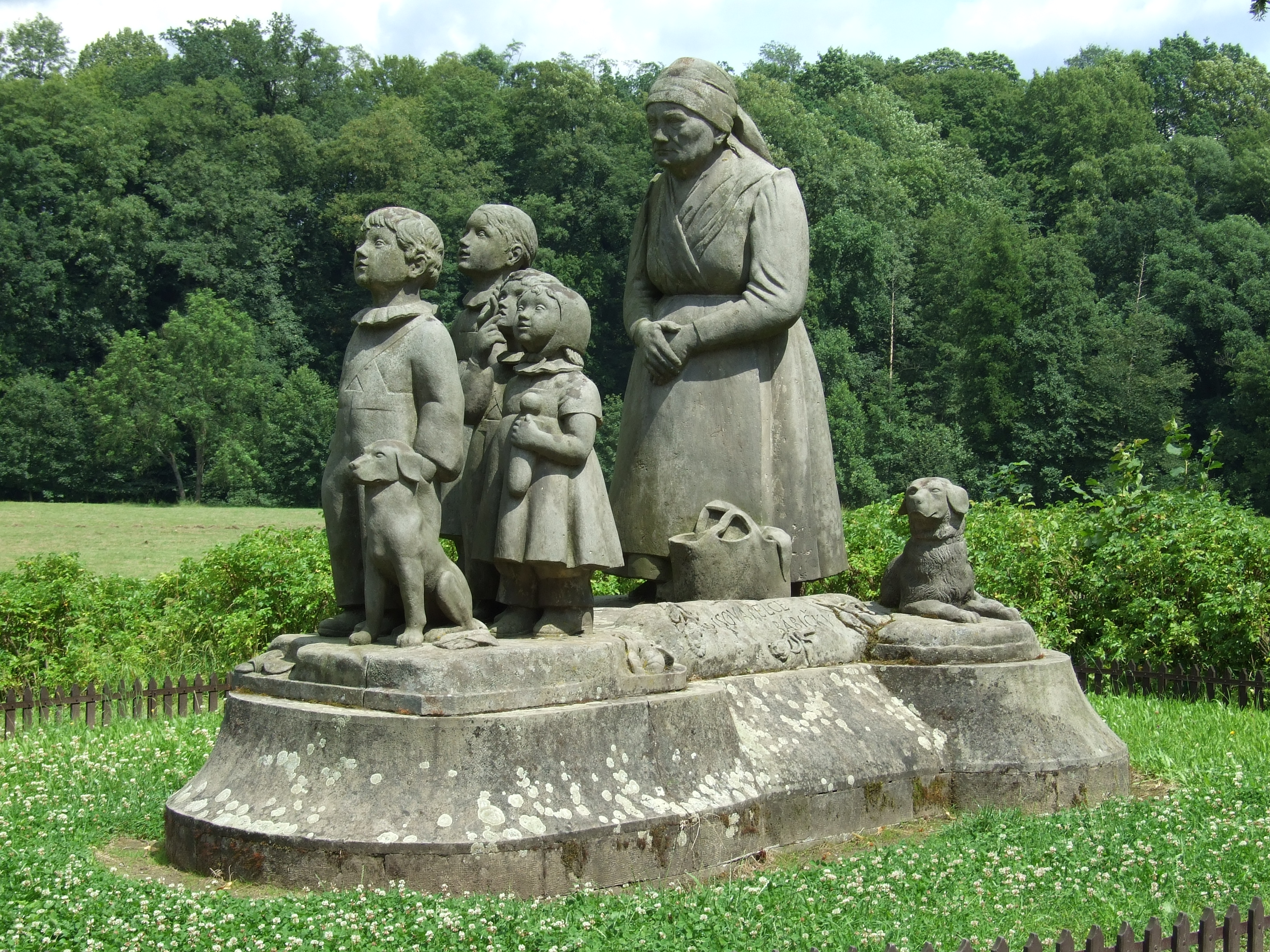 Ratibořice, sousoší Babičky, autor Otto Gutfreund.